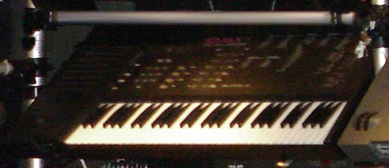 E-mu Emax II (1989) sampling keyboard Shawn Rudiman's Studio, Pittsburgh, PA